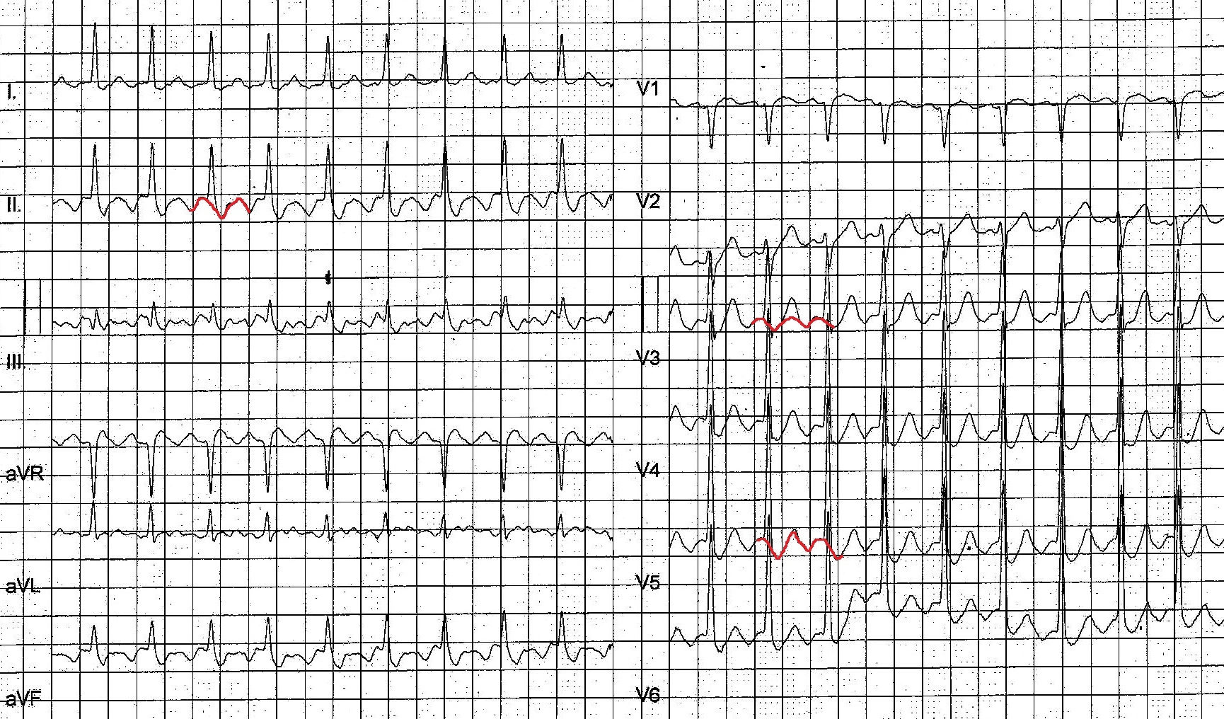 Atrial flutter